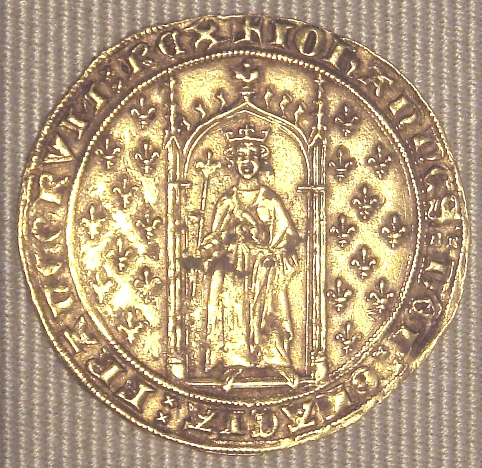 Jean II, denier d'Or aux fleurs de lys